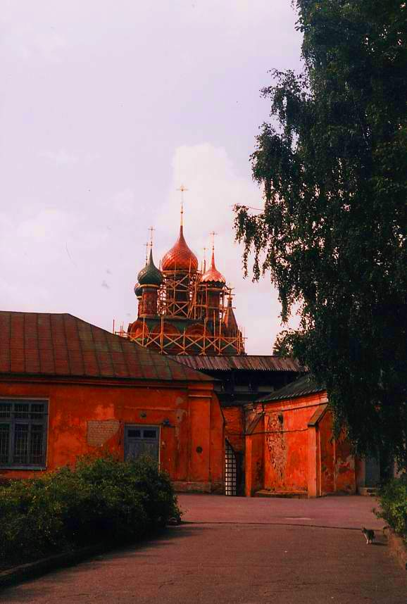 in front of Ансамль Спасо-Преображенского монастыря